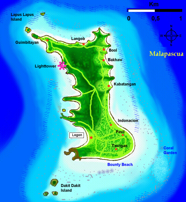 Malapascua-soundings17